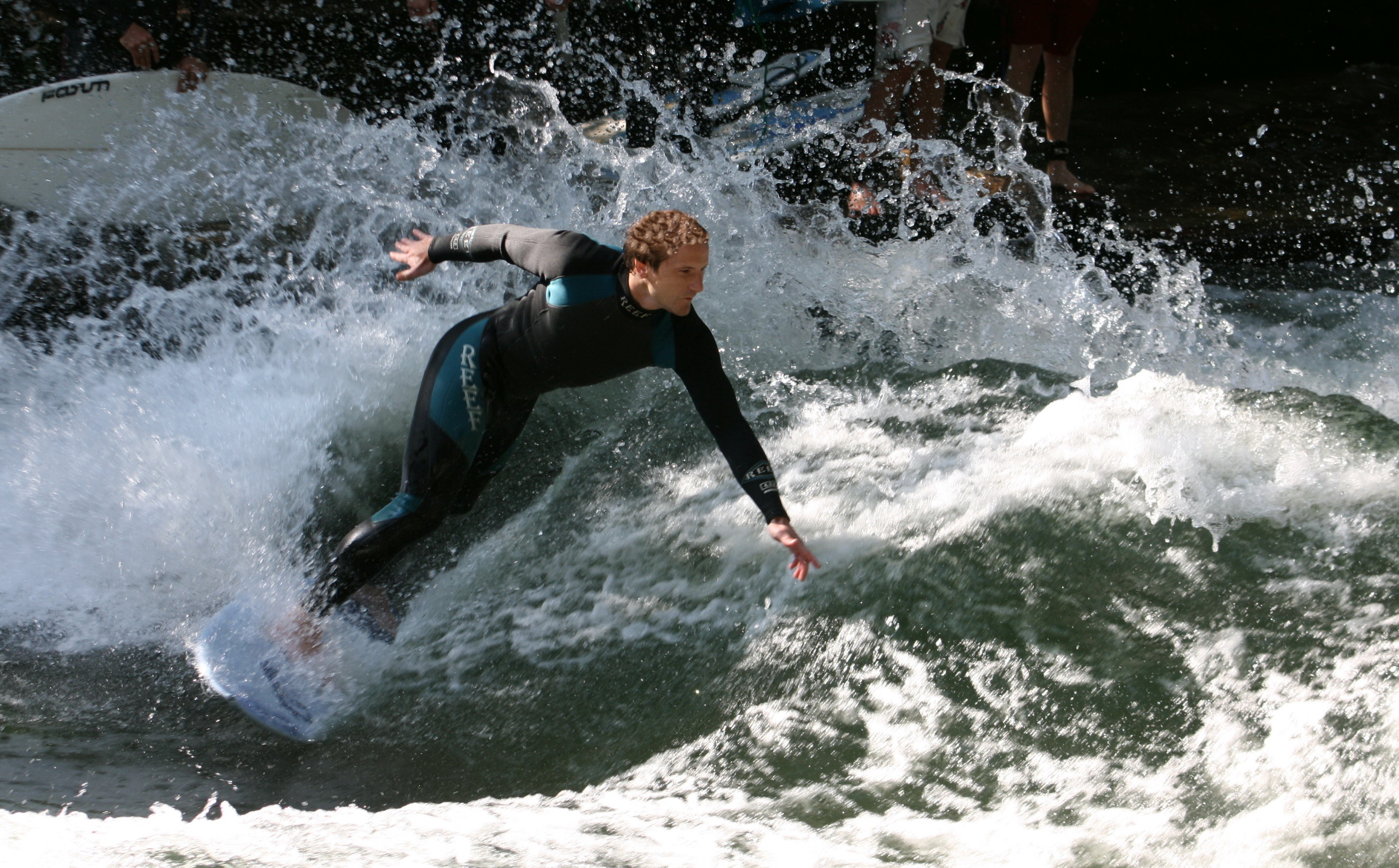 Surfer am Eisbach beim Englischen Garten in München.